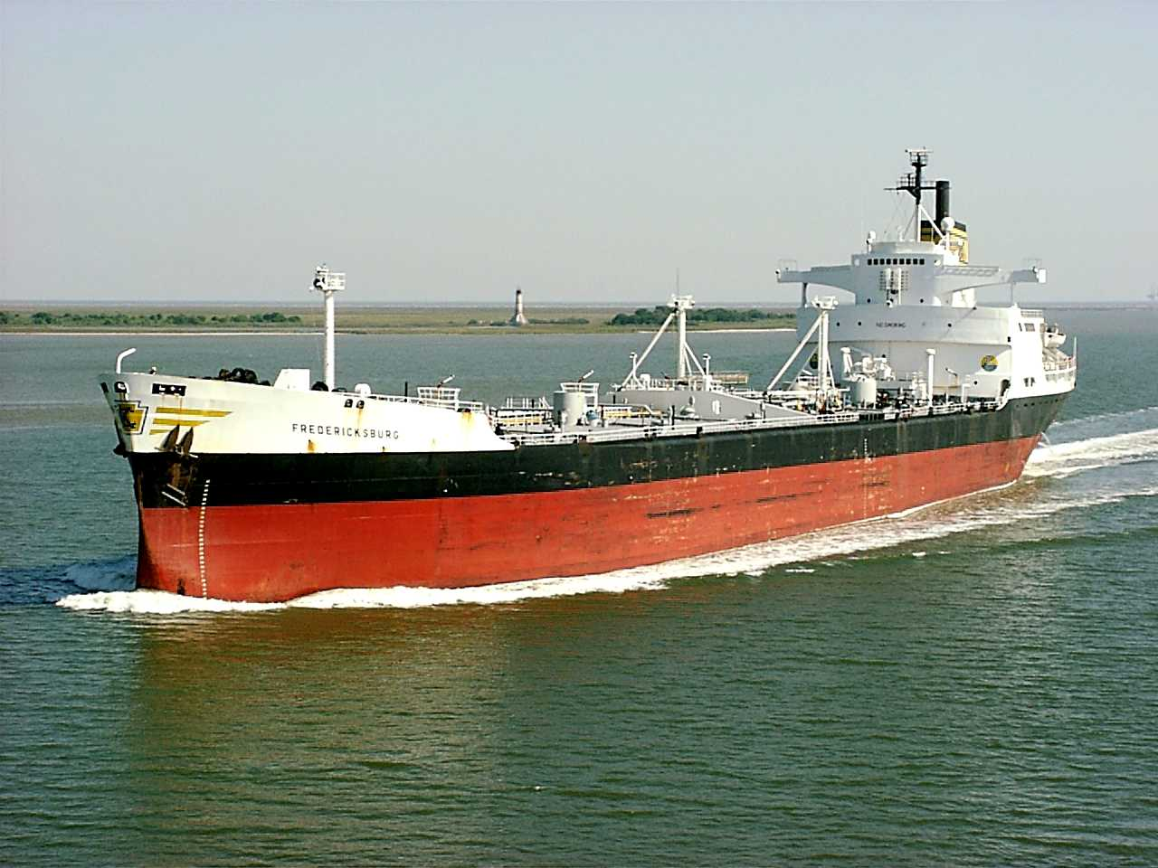 Motor Tanker Fredericksburg (T5)